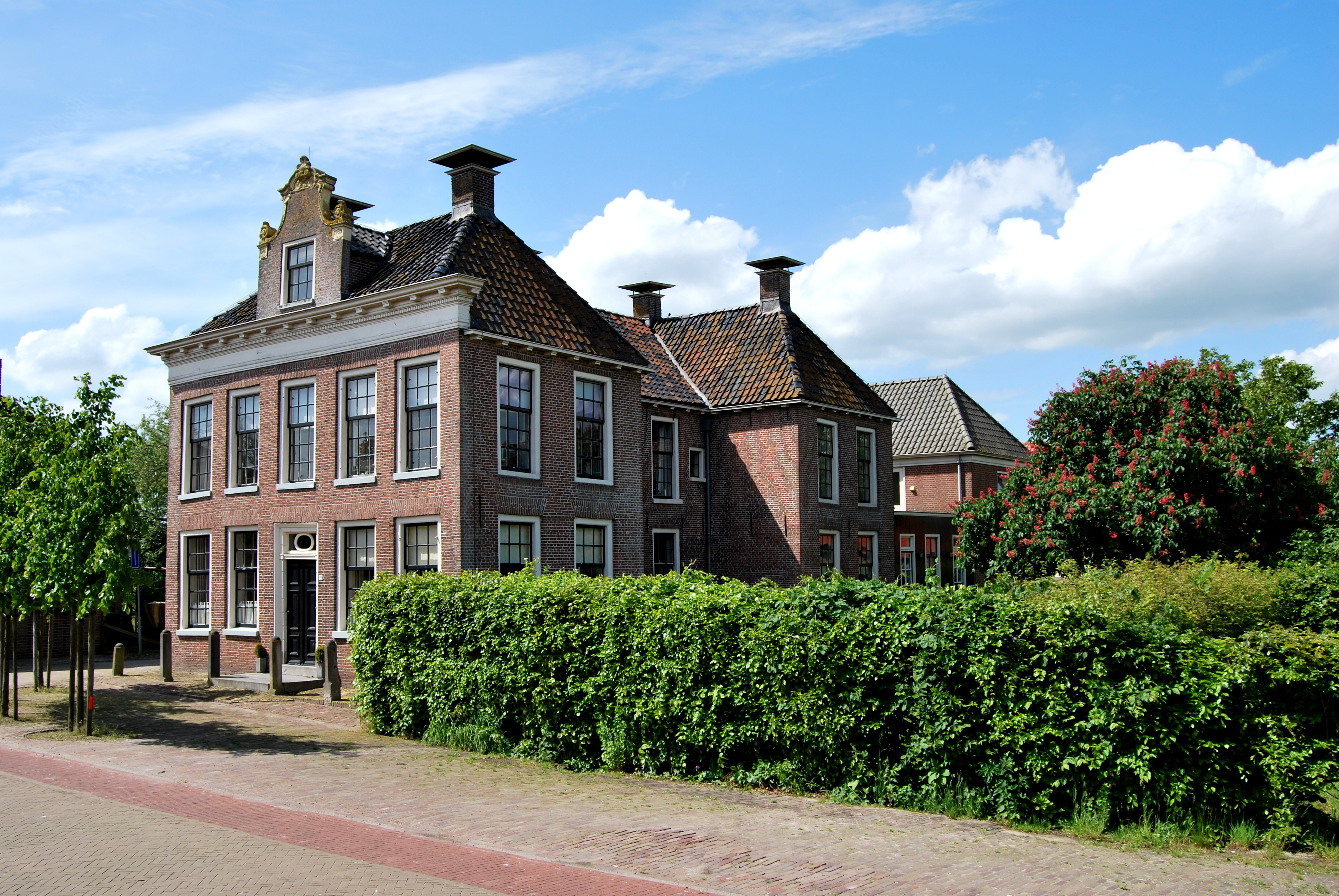 Eastersee, Buorren 19